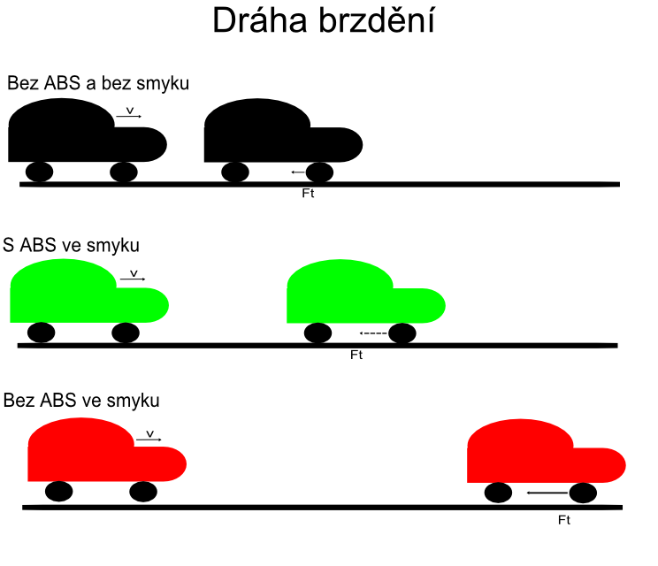 Na obrázku je popsána brzdná dráha automobilu. Bez smyku a bez ABS, s ABS ve smyku, bez ABS ve smyku.